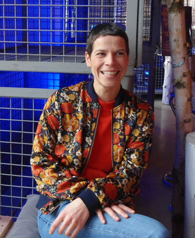 Anne Düe